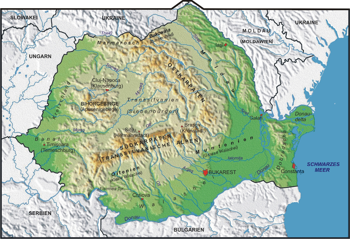 Physische Karte Rumäniens.